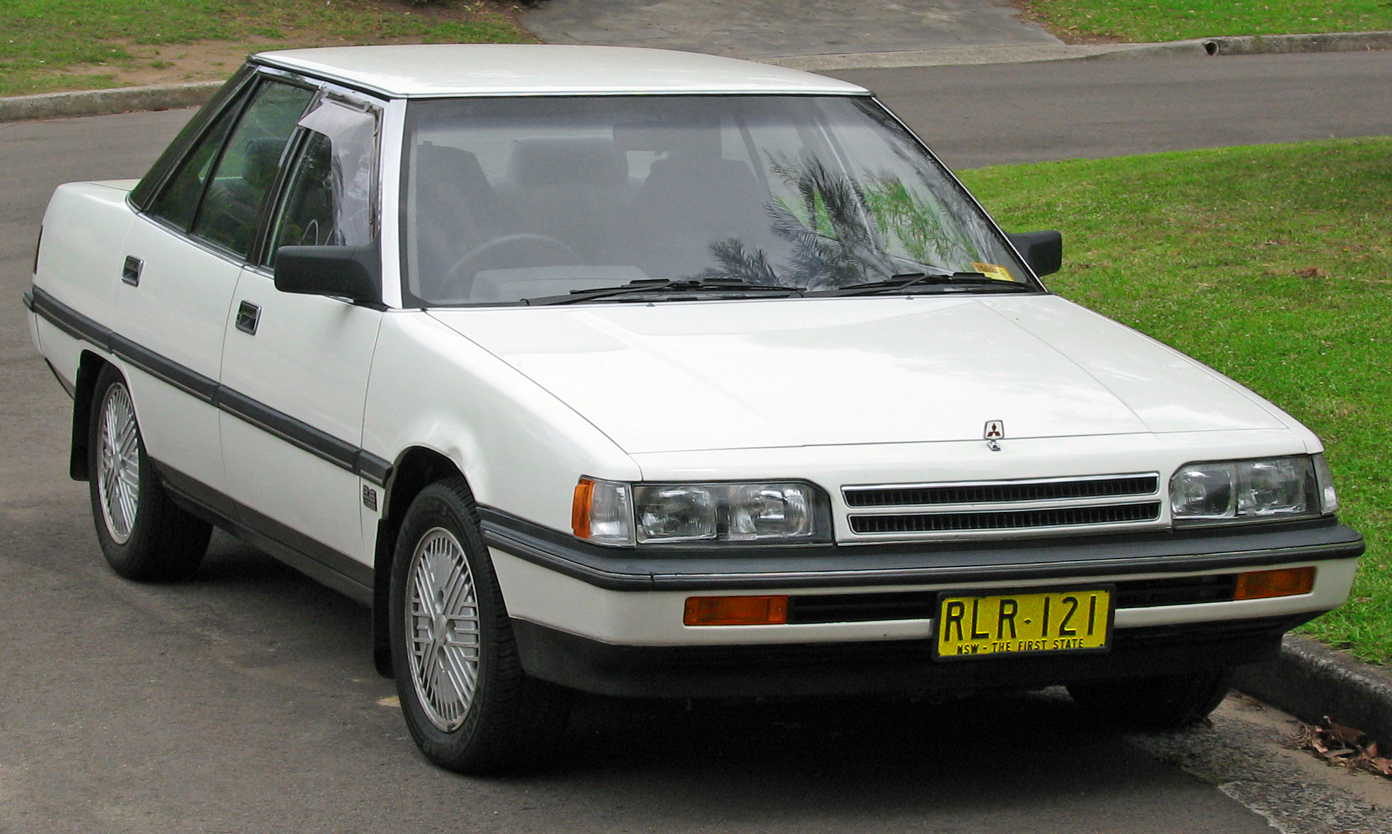 Mitsubishi Magna TP Elite